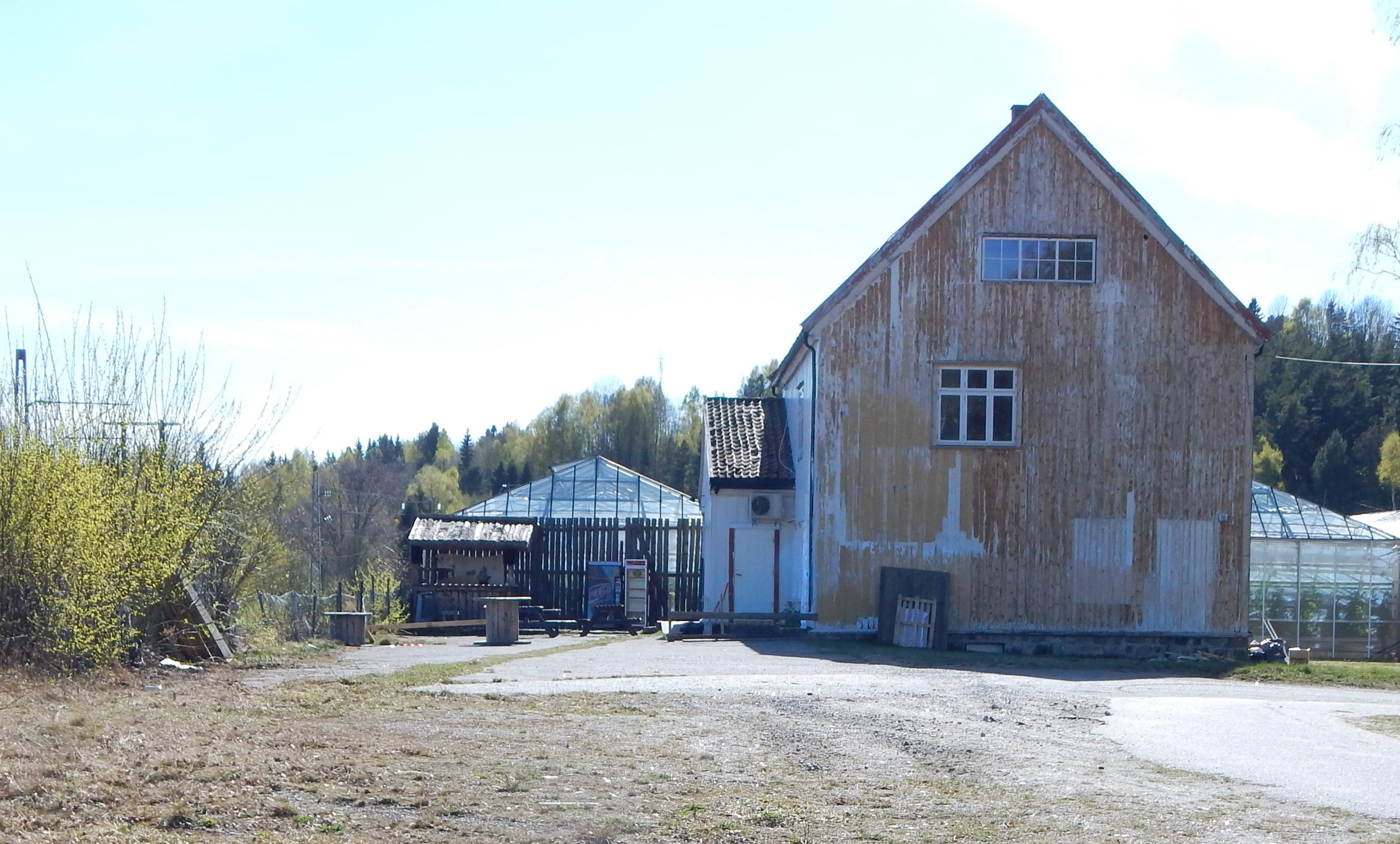 Akkerhaugen stasjon